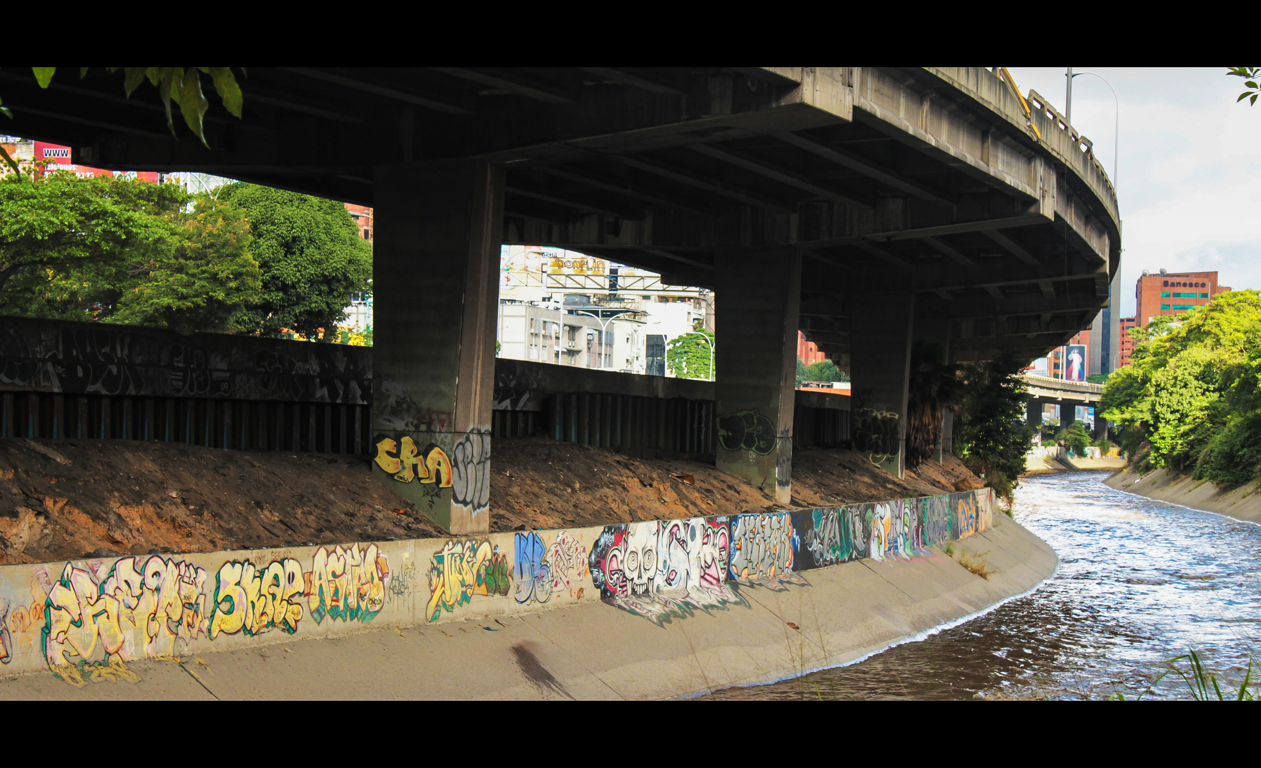 "Río" Guaire a la altura de Colinas de Bello Monte, Caracas